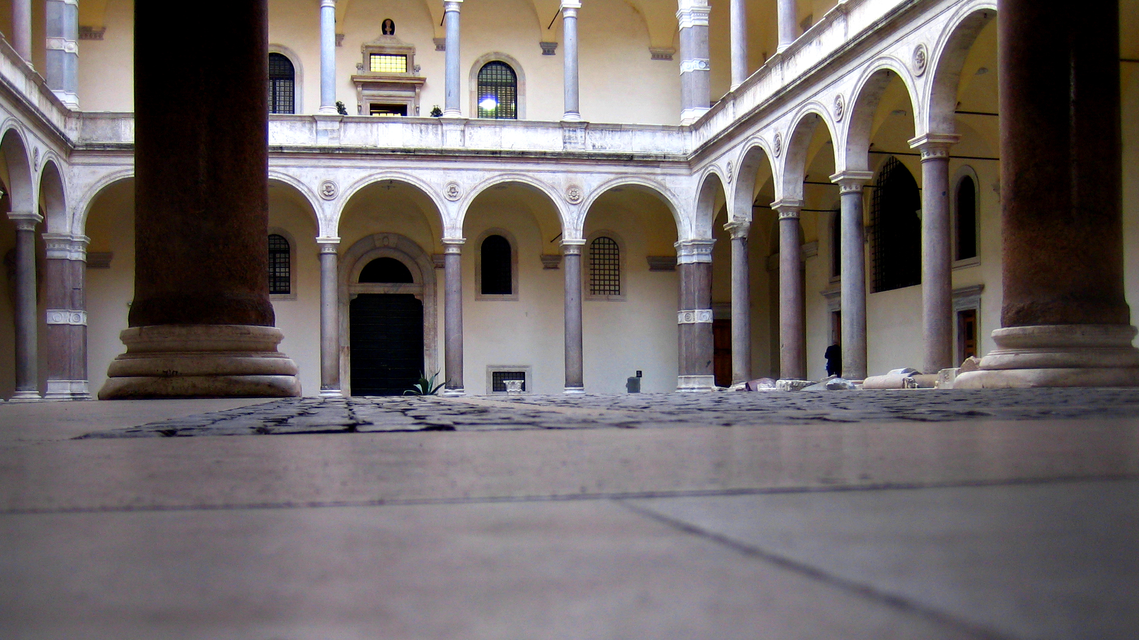 Palazzo della Cancelleria, Roma, Italia